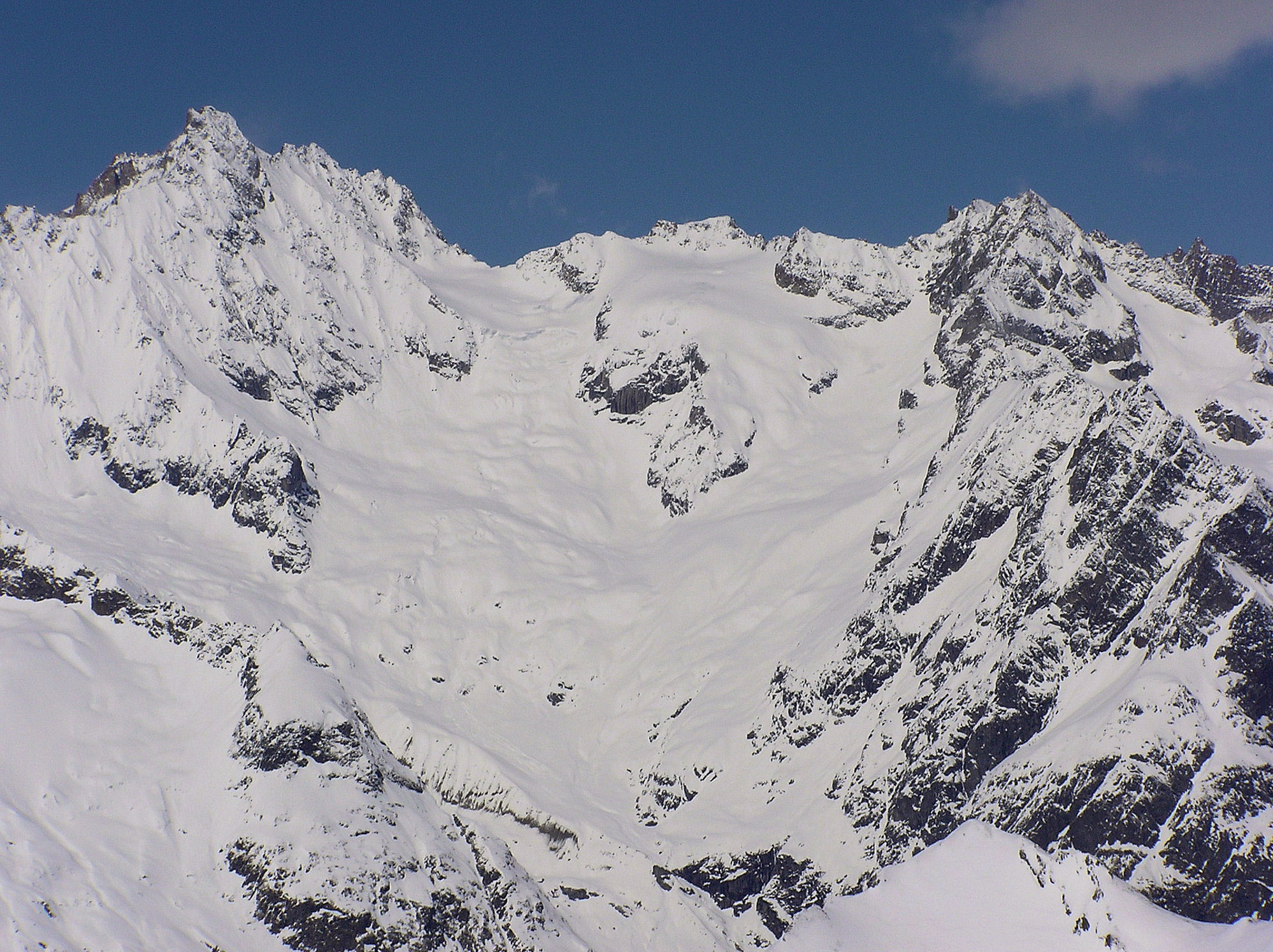 Il Ghiacciaio dell'A Neuve contornato dalla Tour Noir, Grande Lui e Grand Darray - Alpi del Monte Bianco